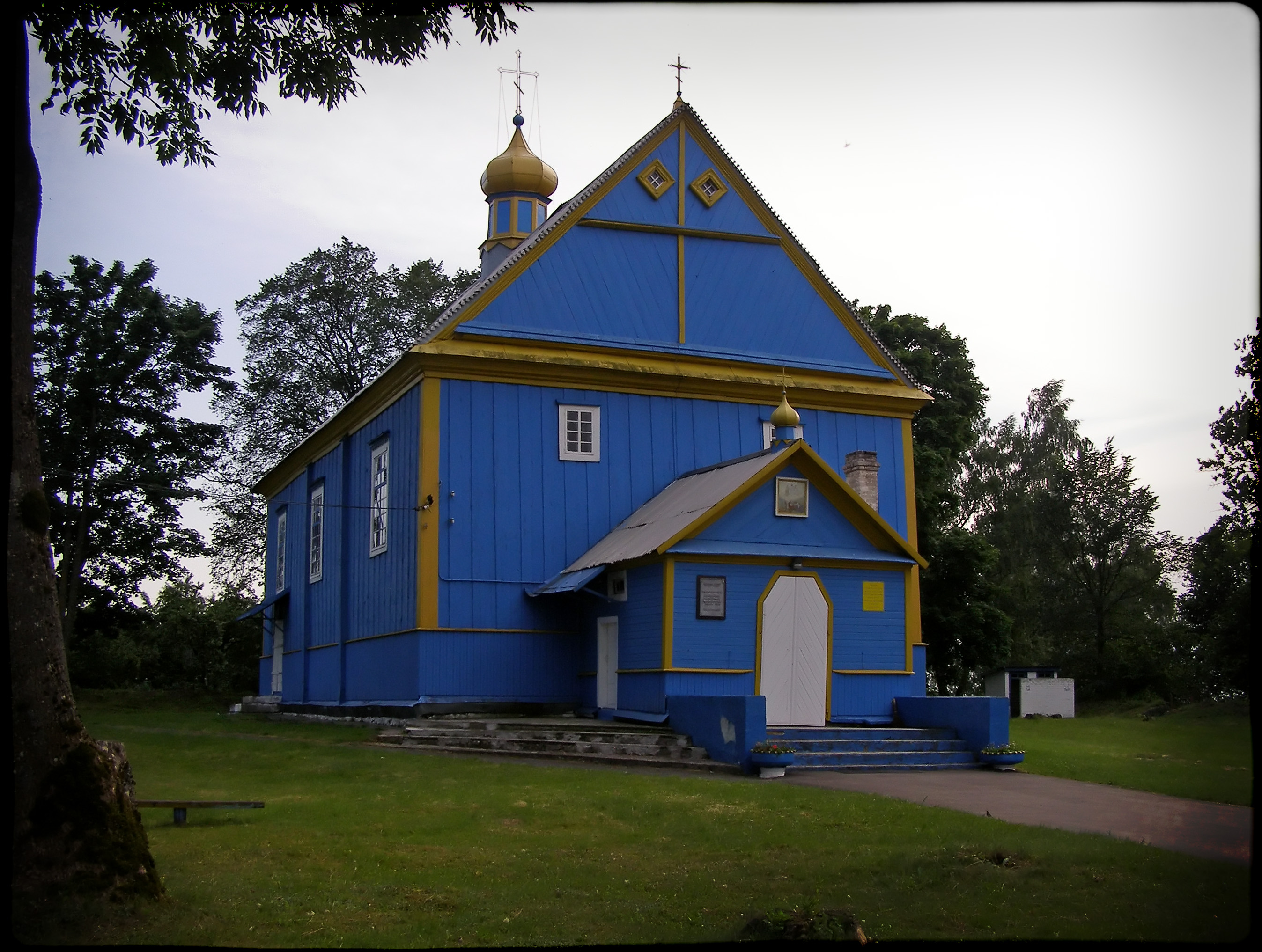 Беларуская (тарашкевіца): Праабражэнская царква. в. Дзьмітравічы This is a photo of Belarusian heritage monument. Reference number: 112Г000347 ( WLM)